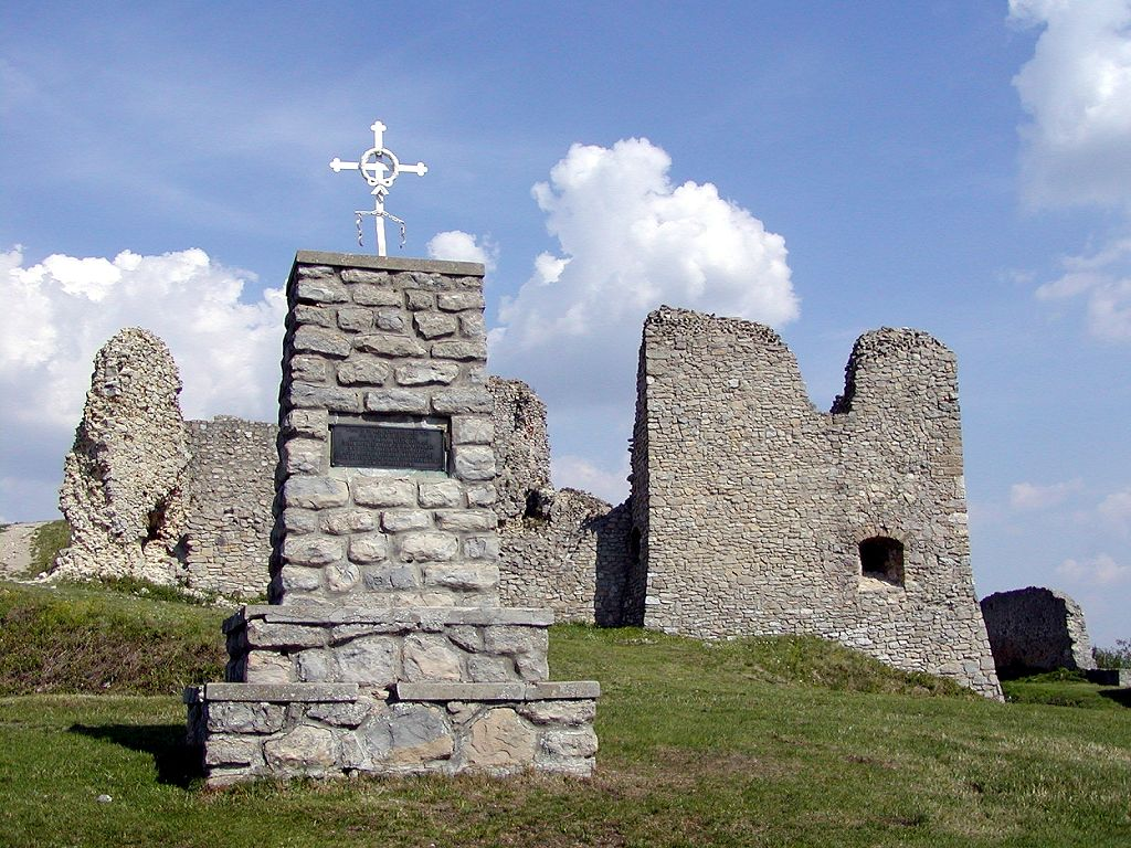 Hrad Branč nad miestnou časťou obce Podbranč - Podzámok, Slovensko.